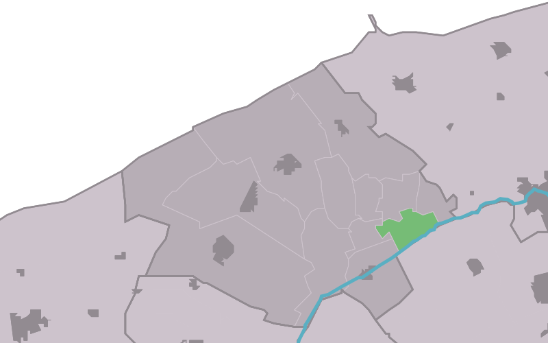 Kaartsje fan himrik fan Jannum